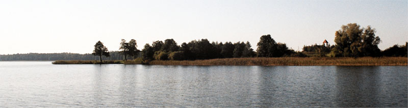 Brzeg jez. Dobskiego w okolicy Doby